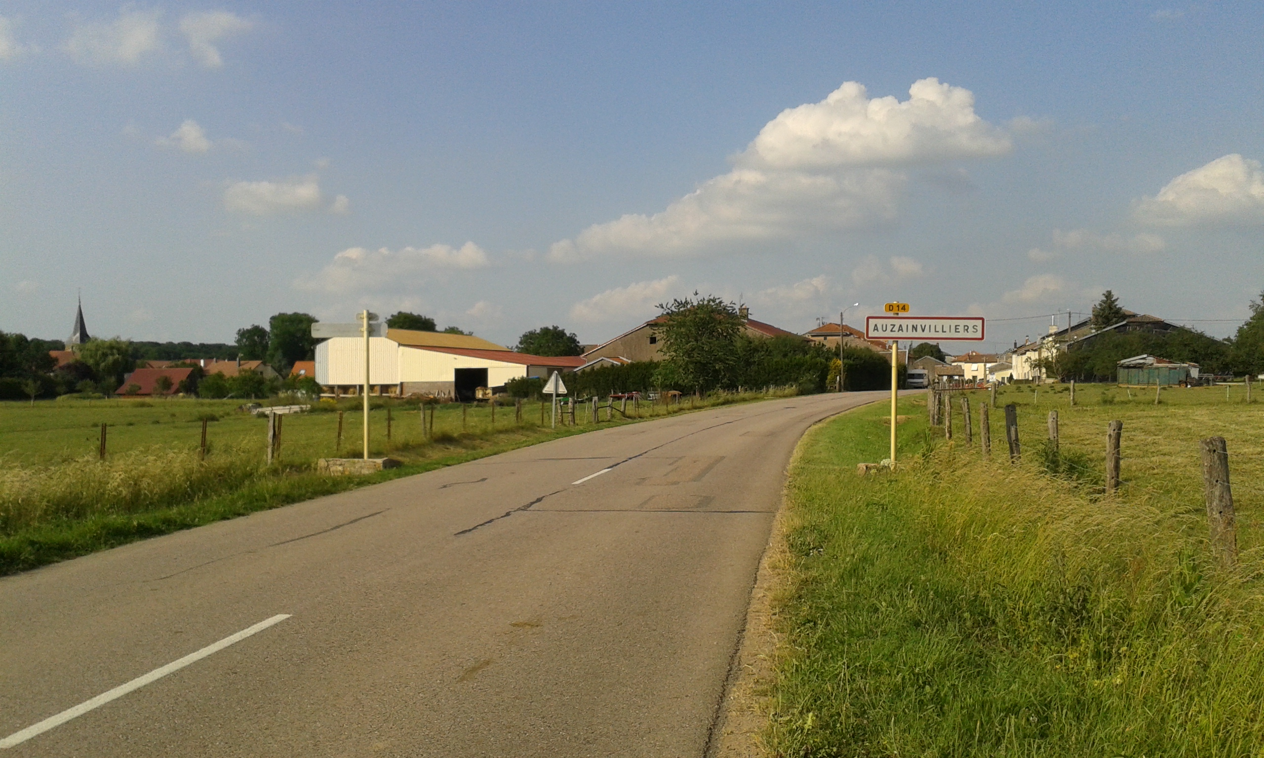 L'entrée du Village en venant de Bulgnéville/Neufchâteau